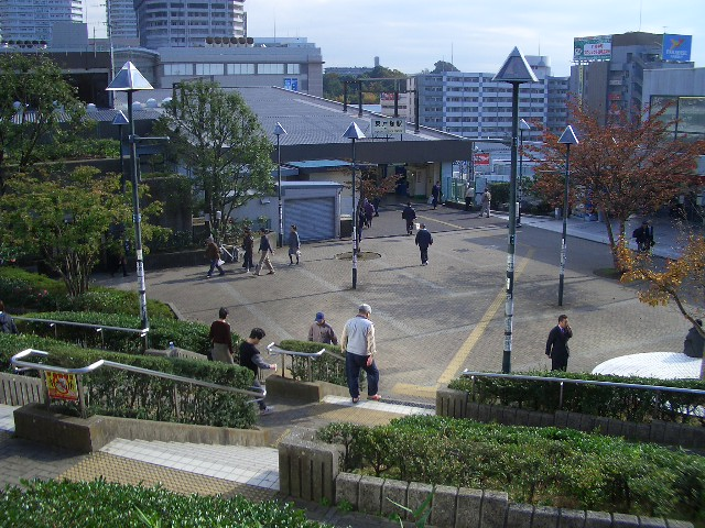 東戸塚駅西口遠景